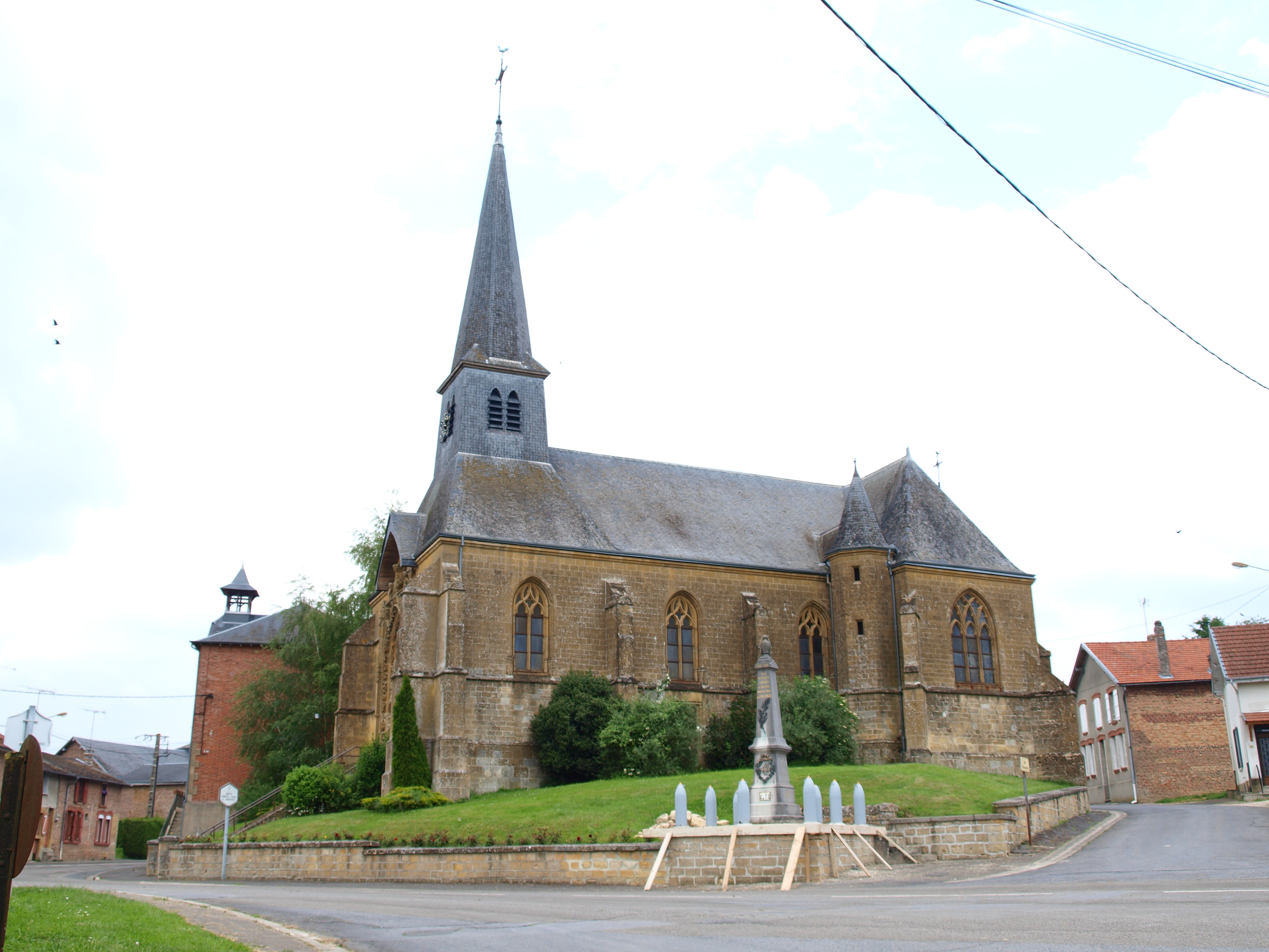 Falaise (Ardennes, France) ; l'église Saint-Victor